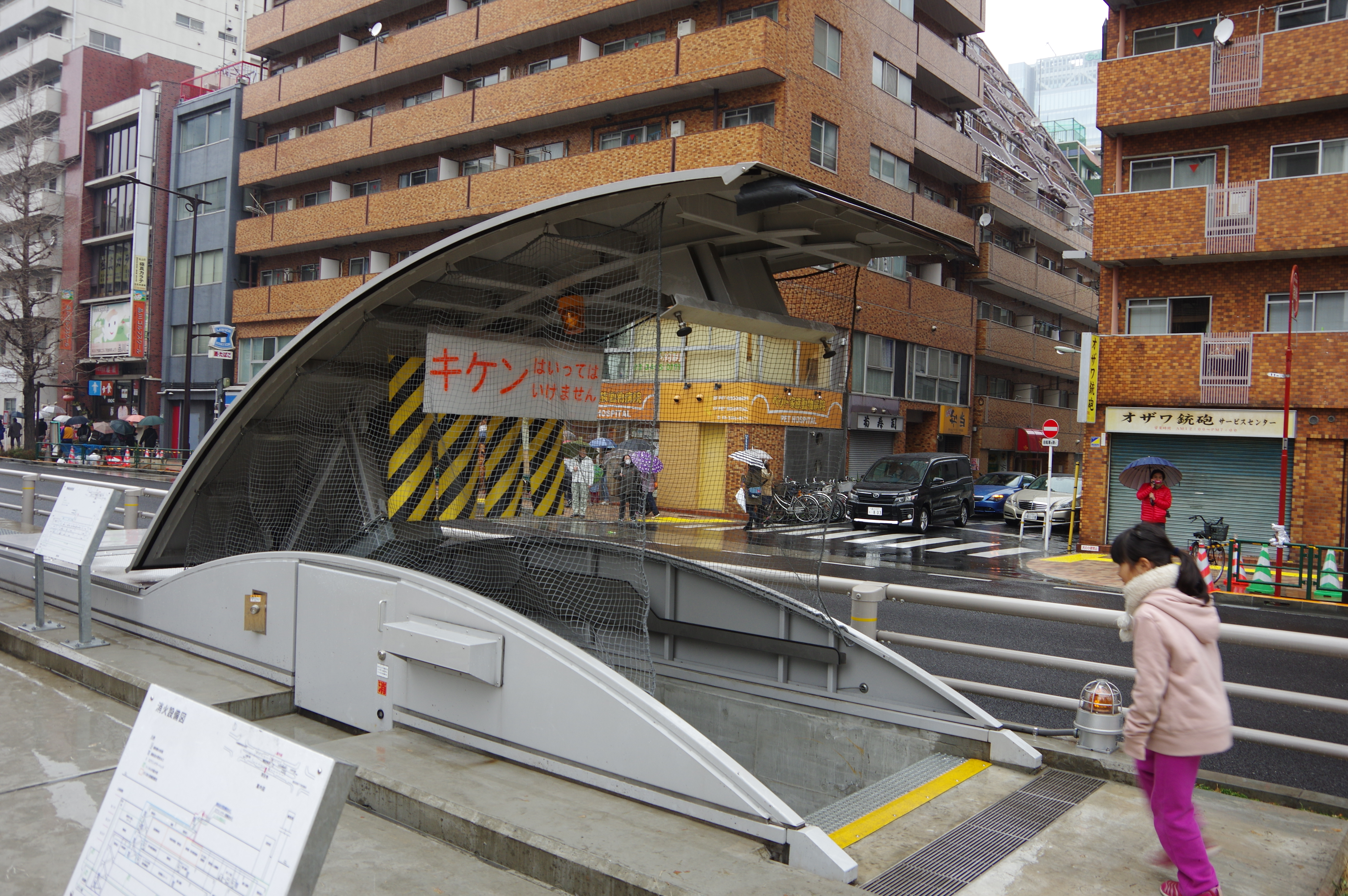 山手トンネルウォーク_138